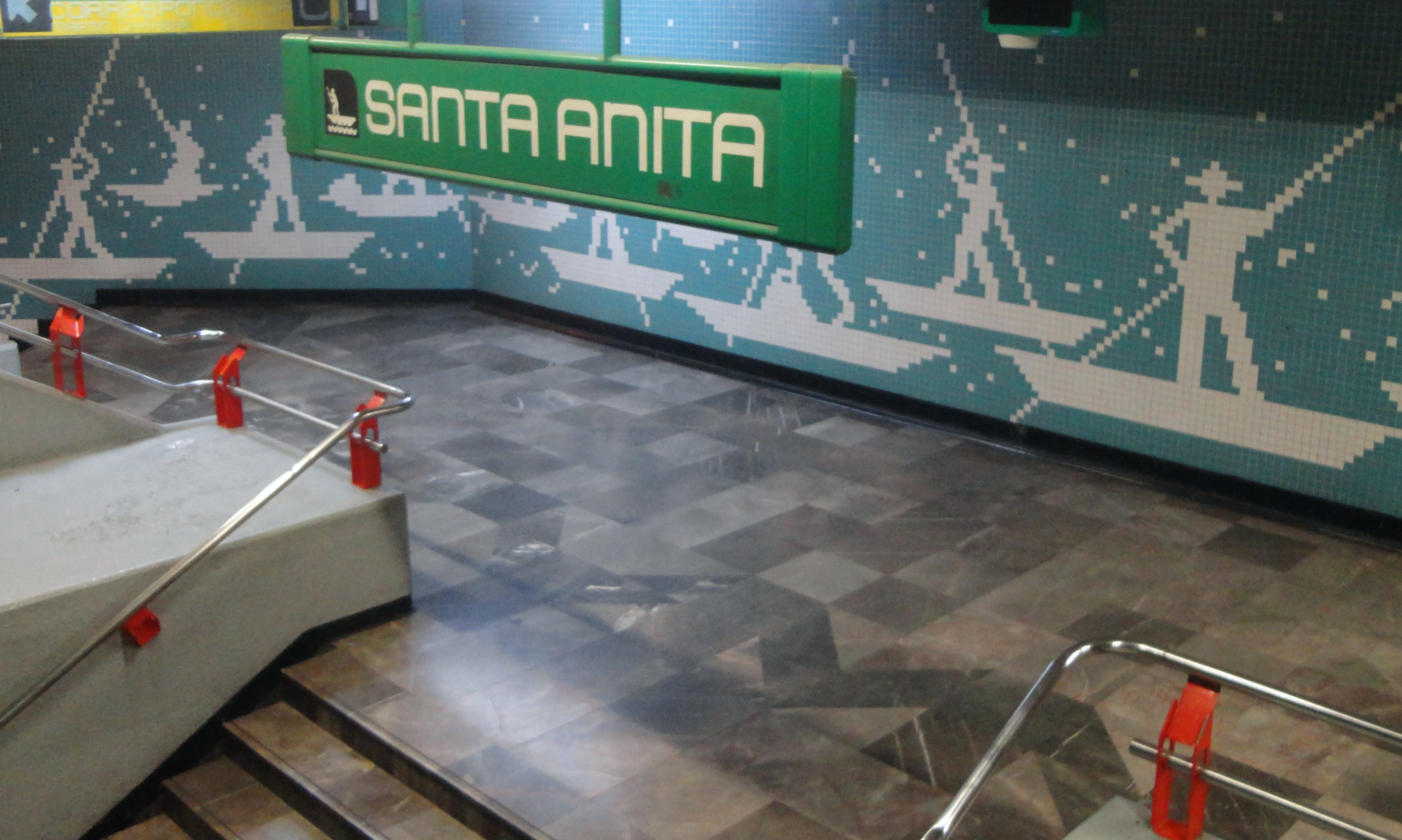 Estación Santa Anita - Línea 8 - Metro de la Ciudad de México